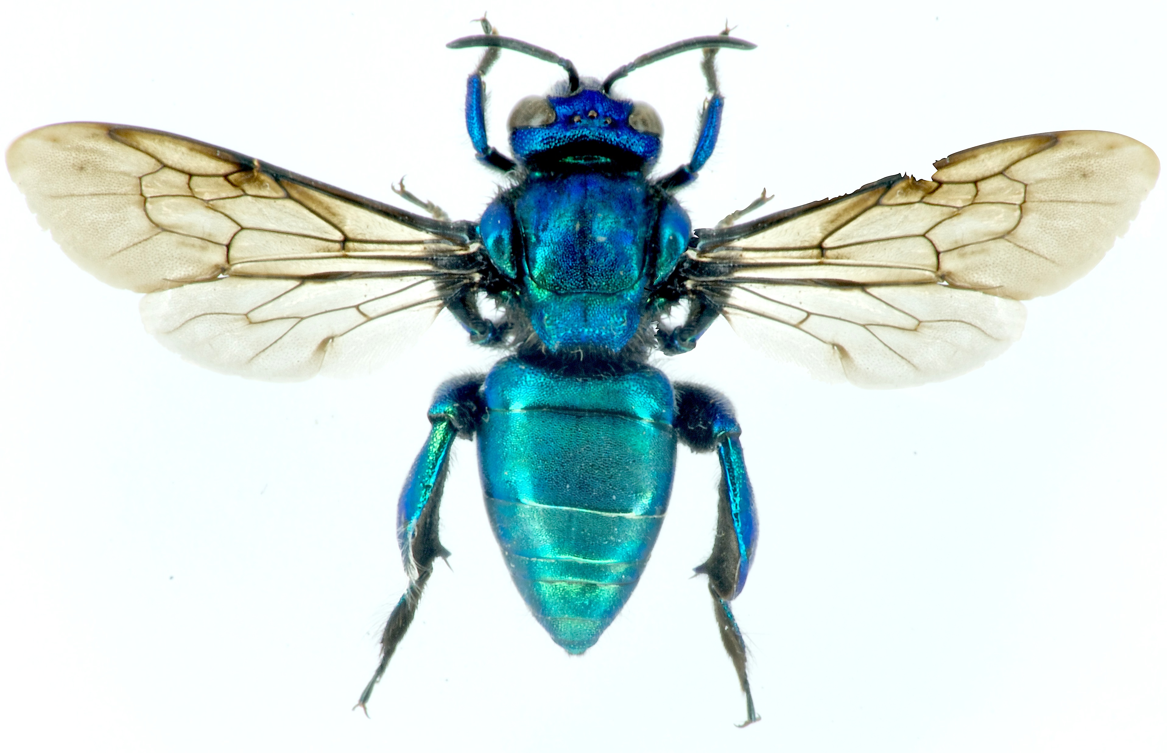 Prachtbiene (Sucre, Bolivien, 12. Sep. 2014)